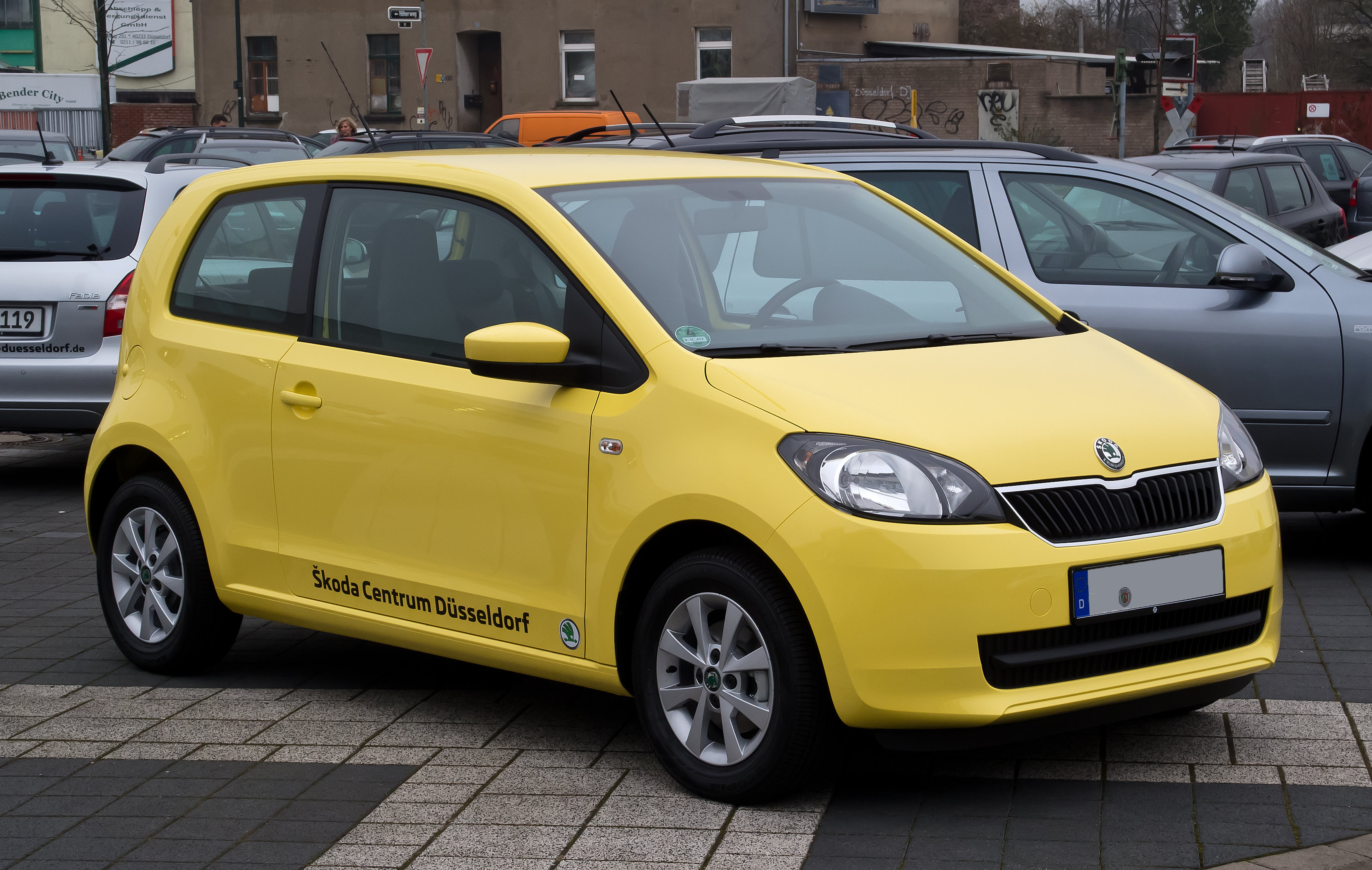 Skoda Citigo 1.0 Ambition